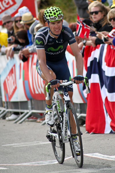 Rui Costa pela Movistar em 2011